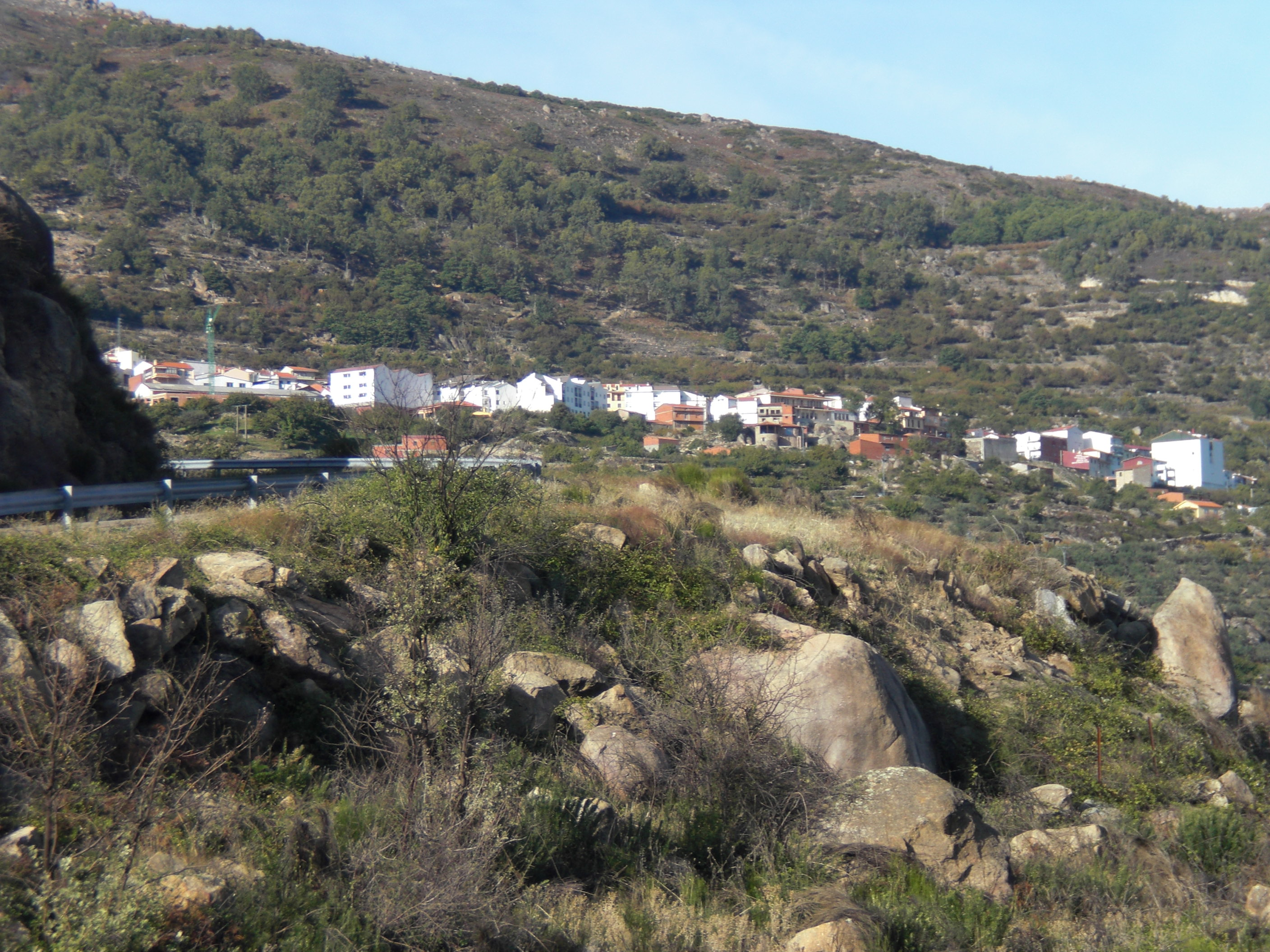 la municipo El Torno en Hispanio